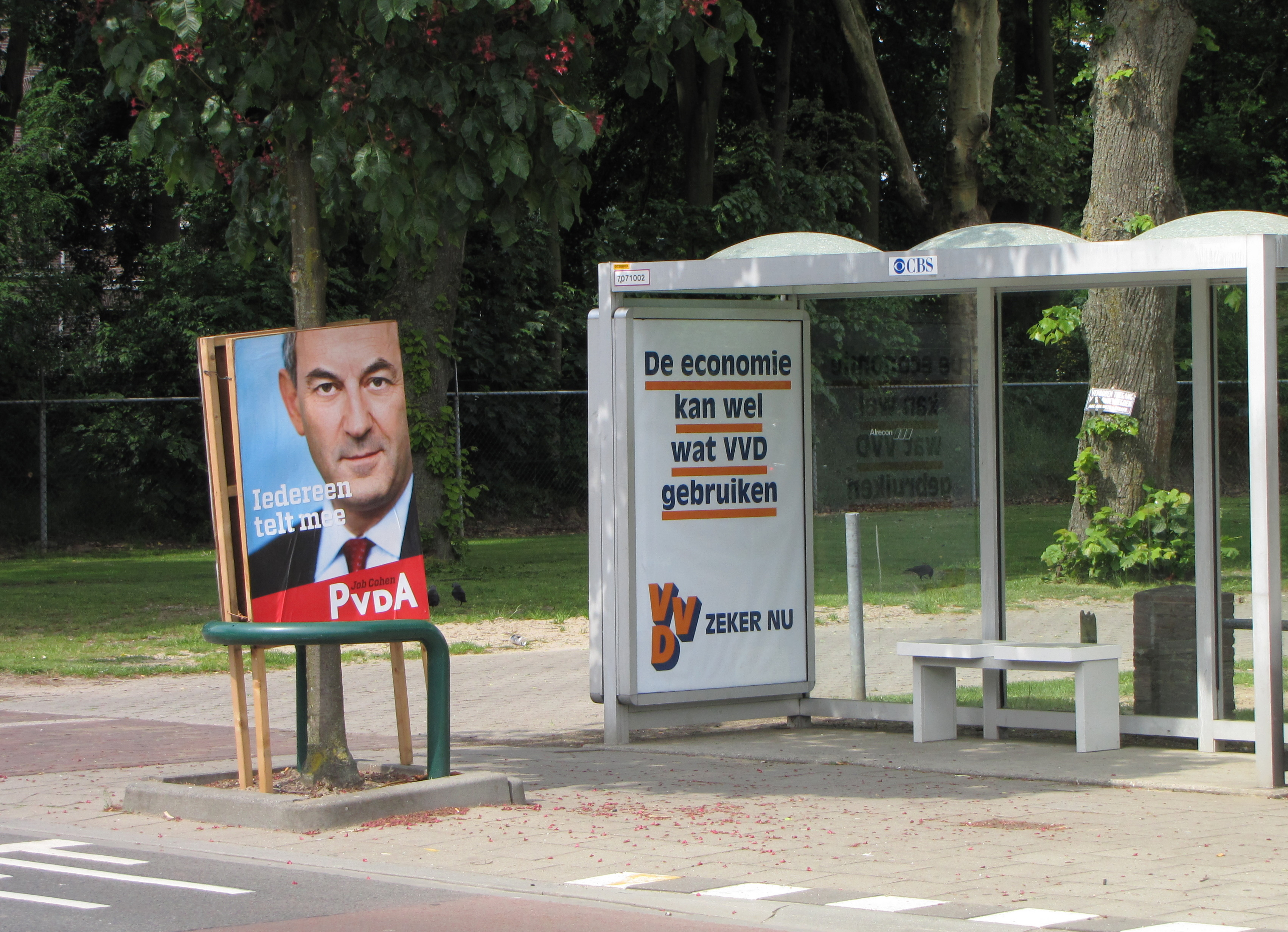 Verkiezingsreclame van PvdA en VVD, Ulft (Oude IJsselstreek).